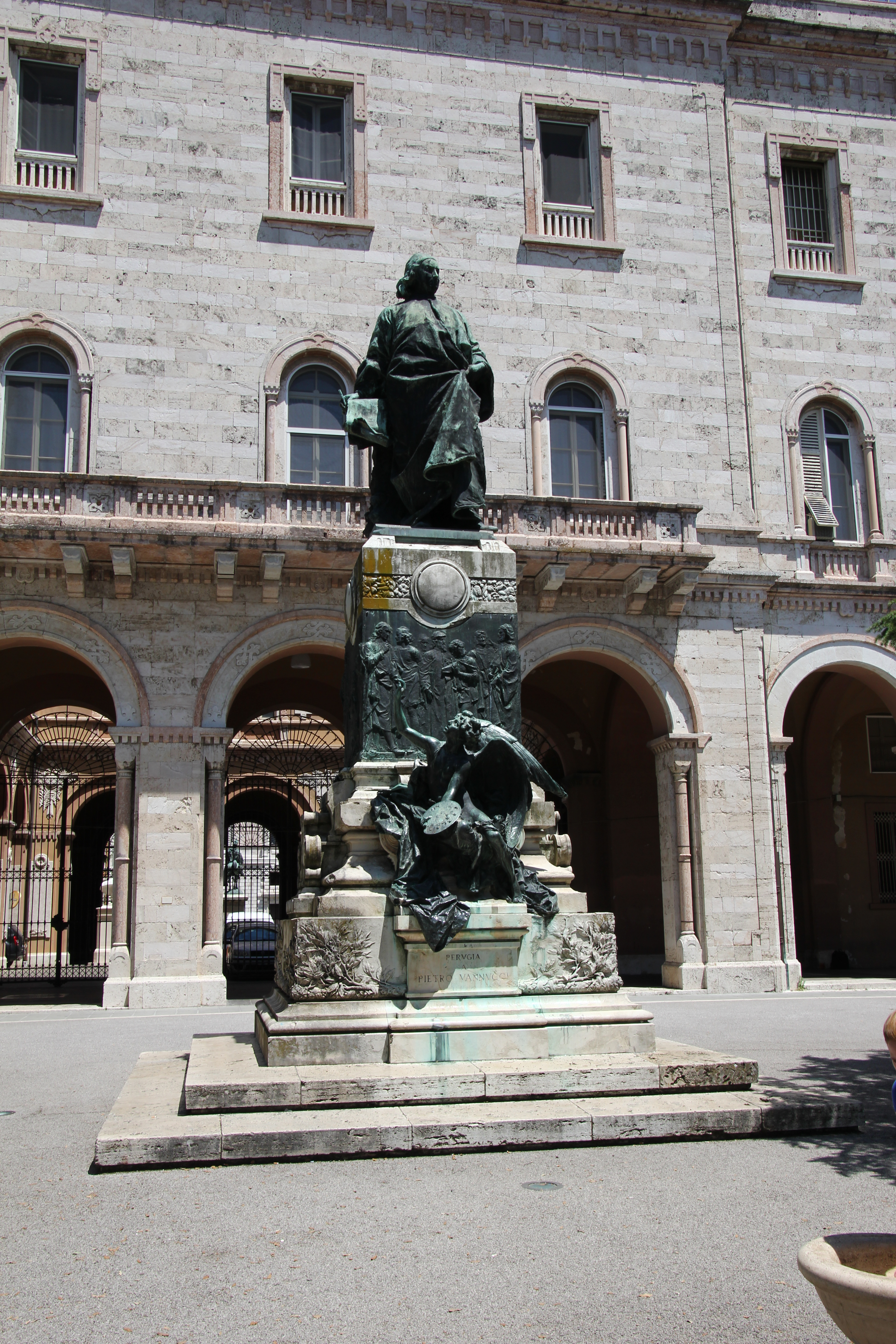 Perugia, statua di Pietro Vannucci